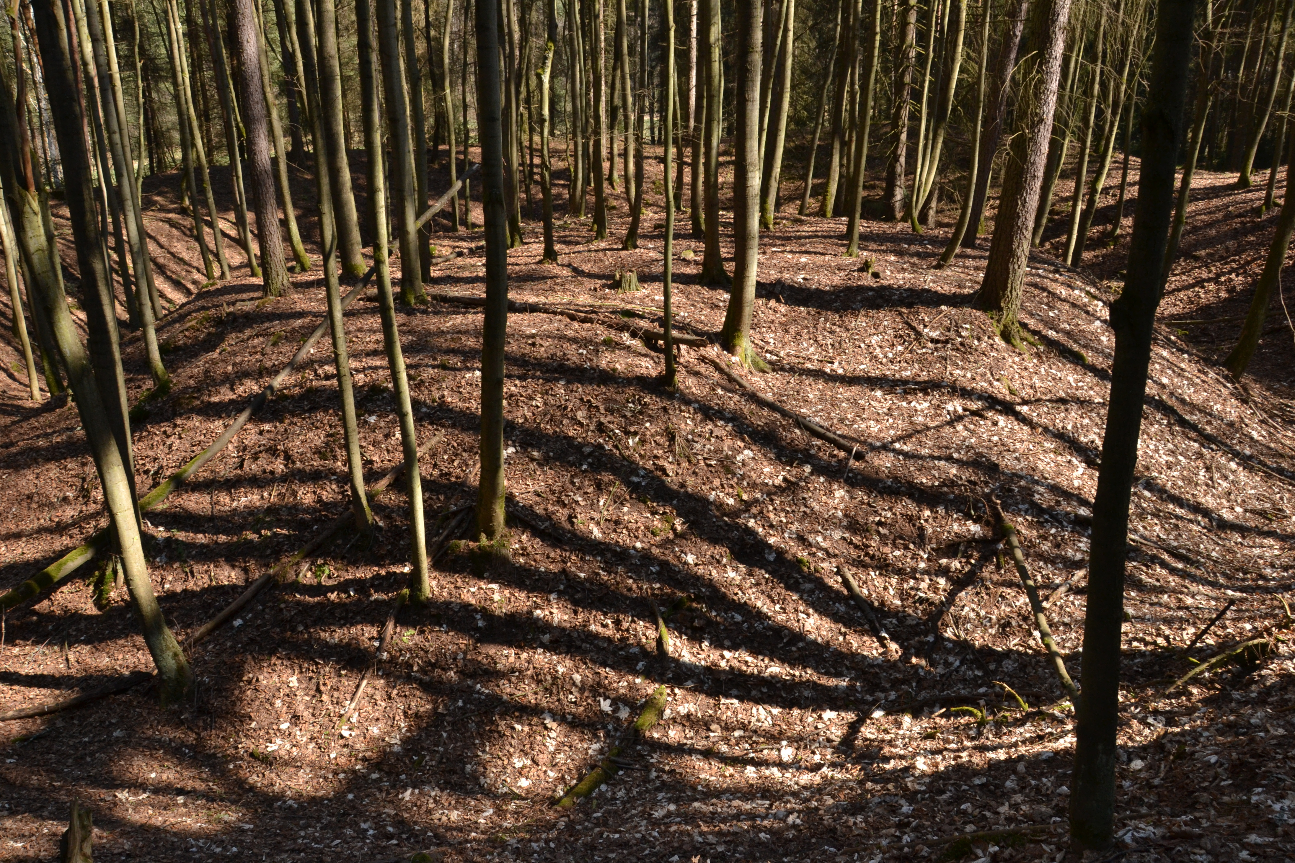 Tvrziště Smrk – centrální pahorek